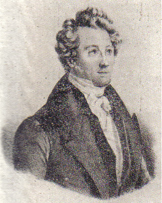 Portrait of Alexandre Gendebien